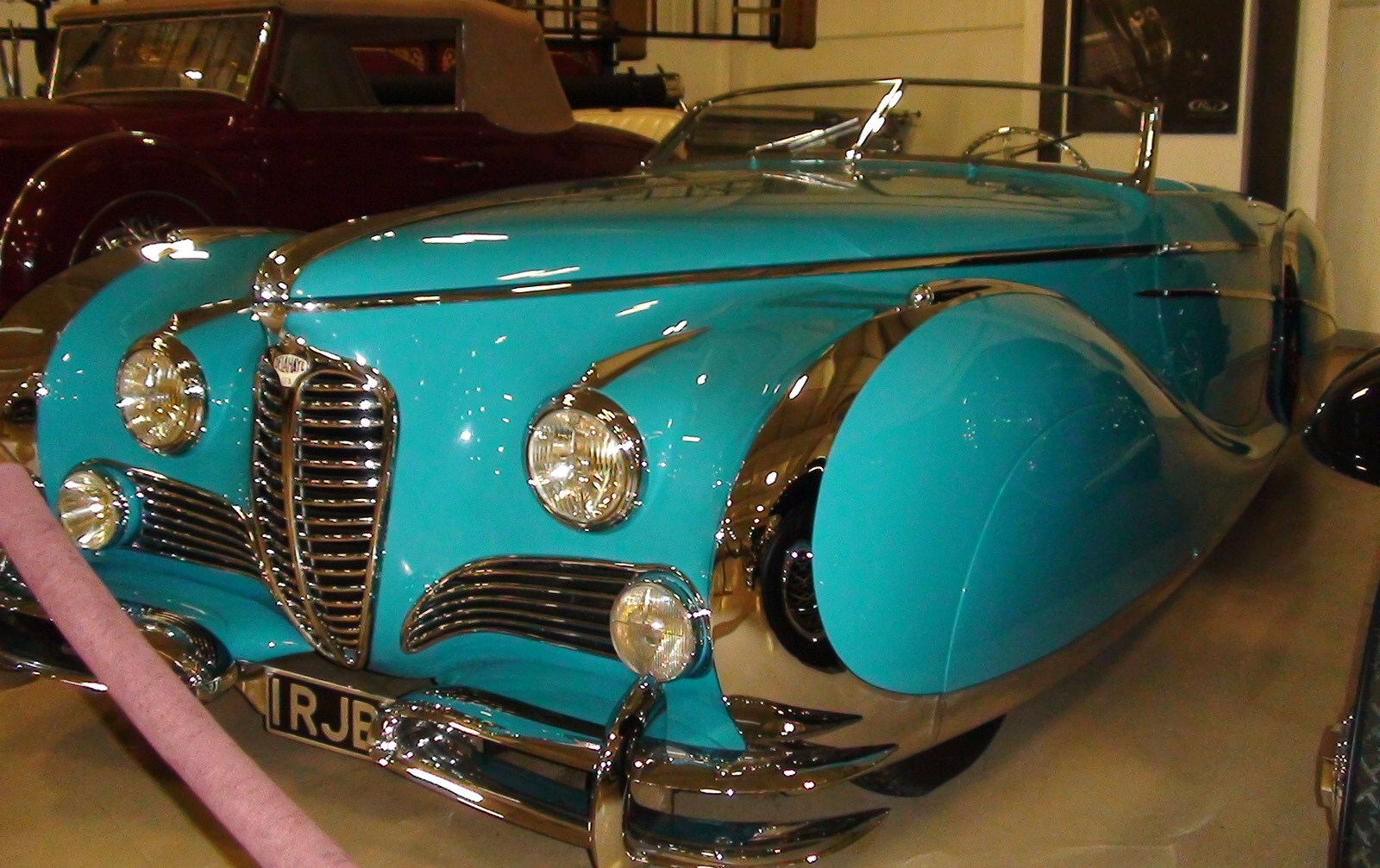 Delahaye